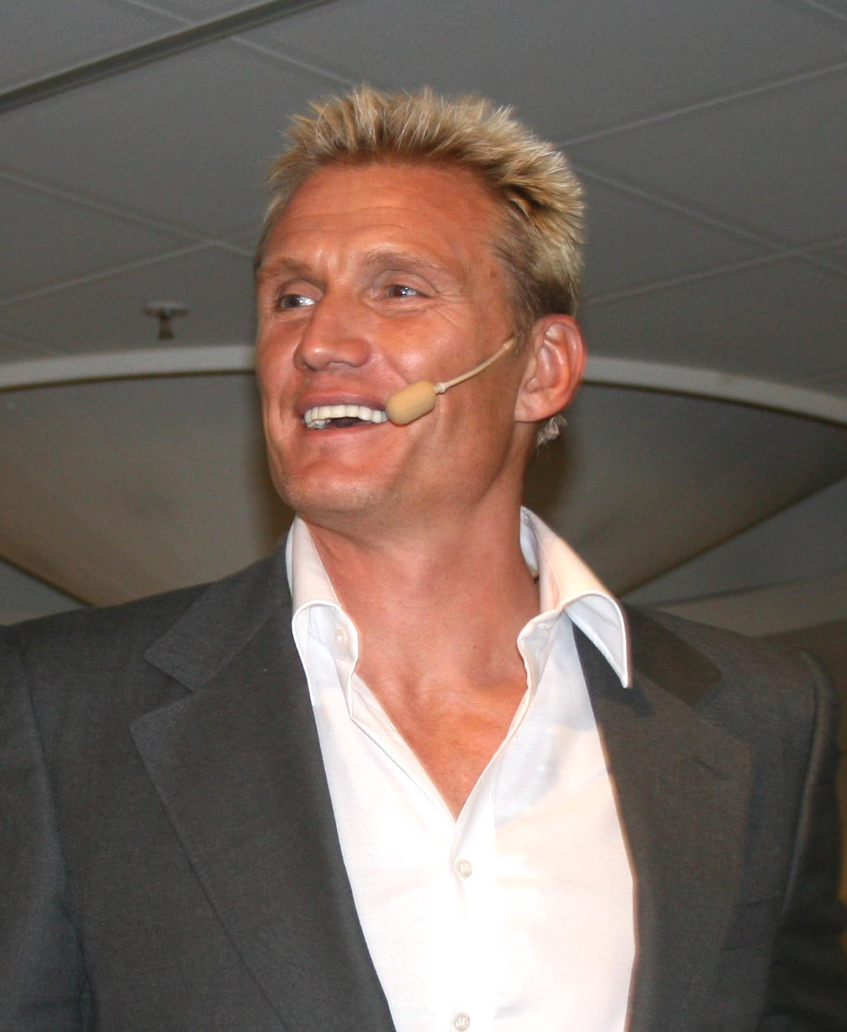 Dolph Lundgren